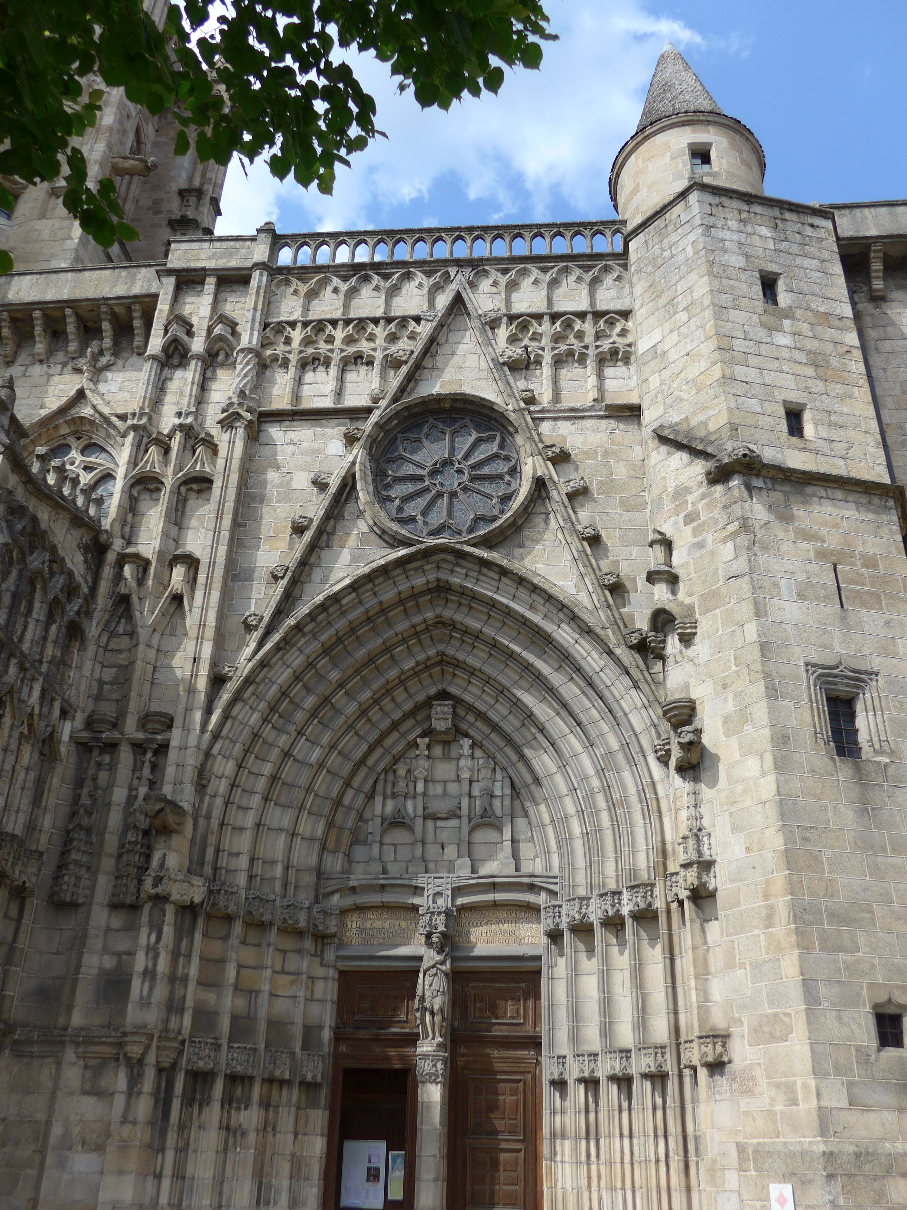 Église Saint-Jean d'Ambert. Une église aux allures de cathédrale! A l'intérieur en plus des orgues on remarque une "trompette" qui servait à appeler à la messe durant la période pascale, puisque les cloches partaient à Rome. .